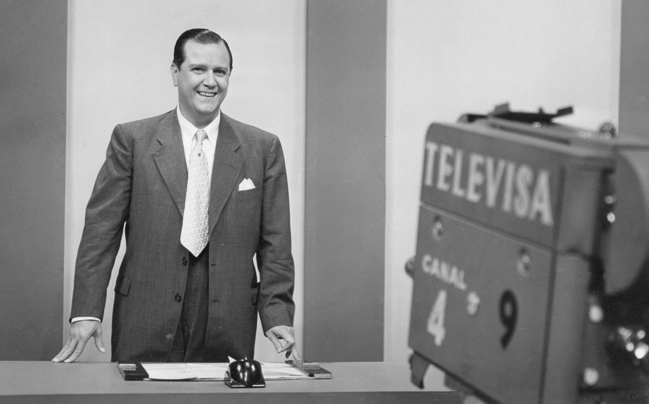 Rafael Caldera en su programa de televisión: Aula de Conferencias TV, transmitido por Televisa.